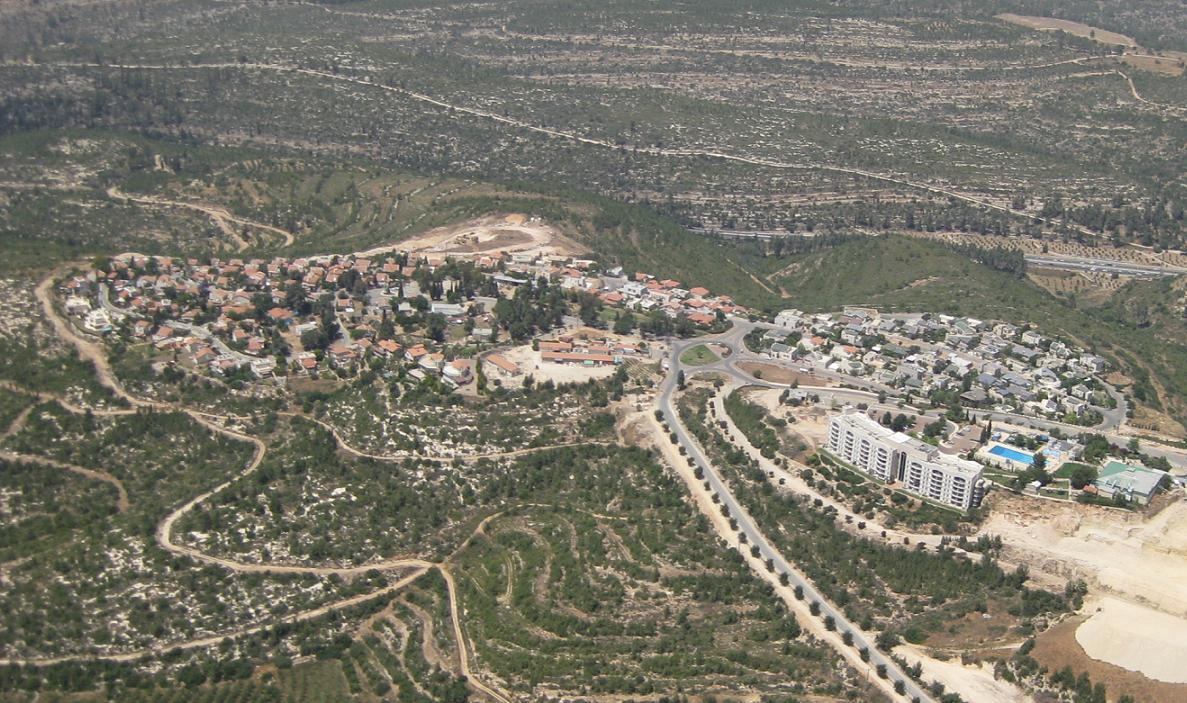 צילום אויר של מושב שורש.